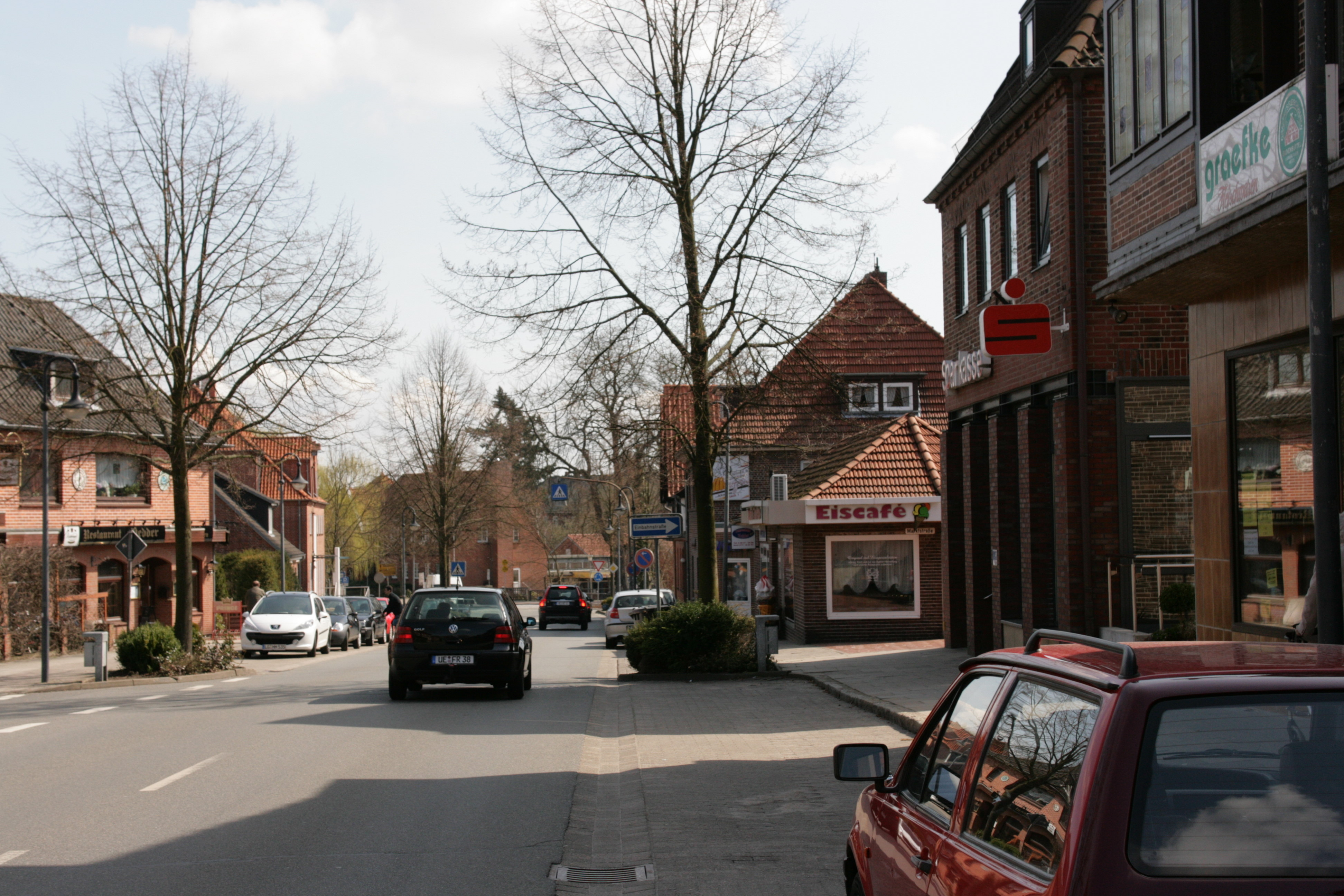 Bahnhofstraße in Bienenbüttel